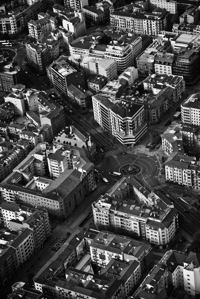 merindades